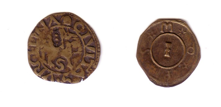 Pellofes (Moneda local catalana) de la Seu d'Urgell i Peramola. Una pellofa o plom és una peça monetiforme feta amb fines planxes de llautó i amb simbologia i inscripcions de caire religios que circulaven, amb valor monetari, a l'interior d'algunes comunitats religioses catalanes, entre els segles XIV i XIX.